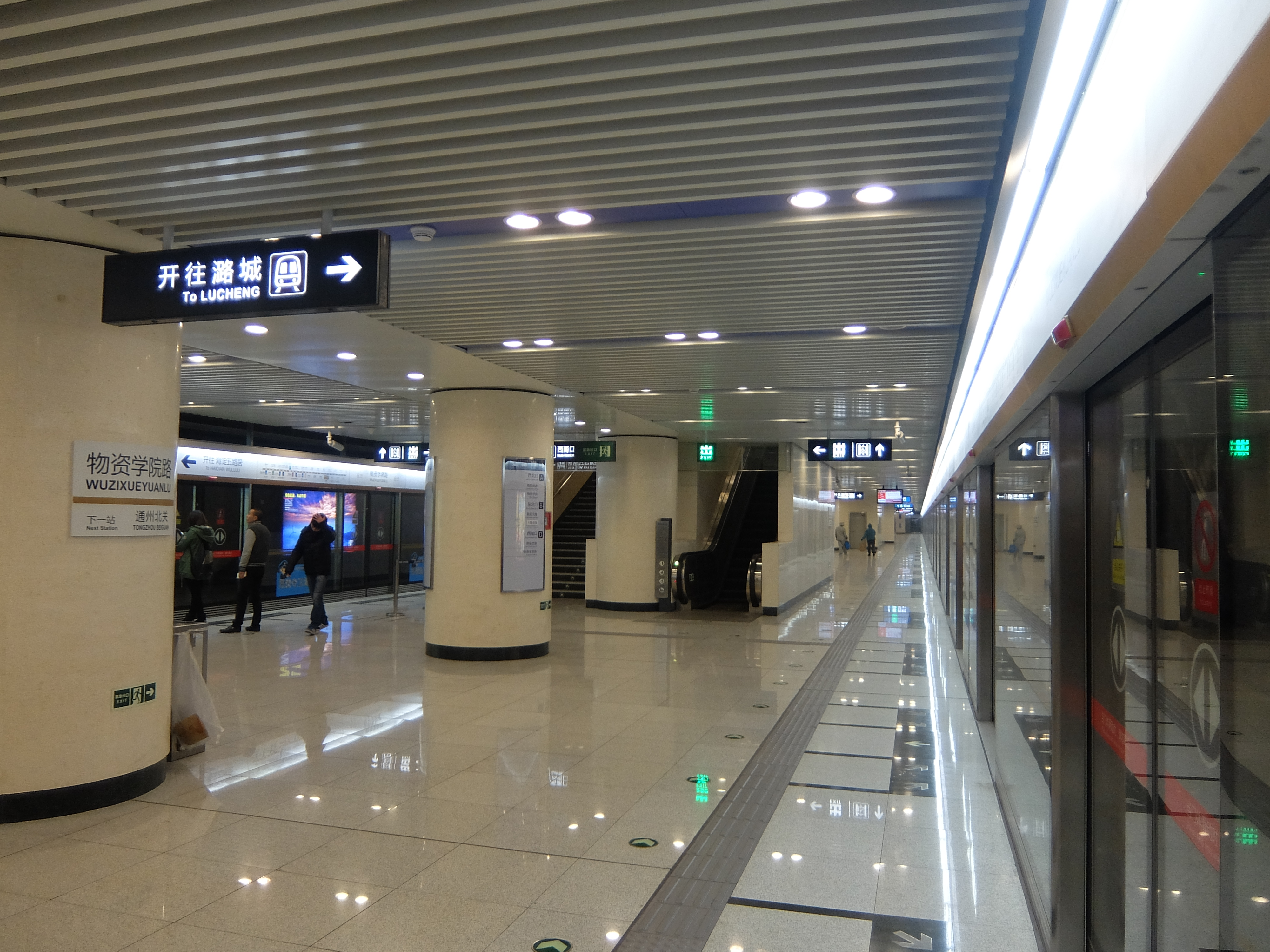 北京地铁6号线物资学院路站站台